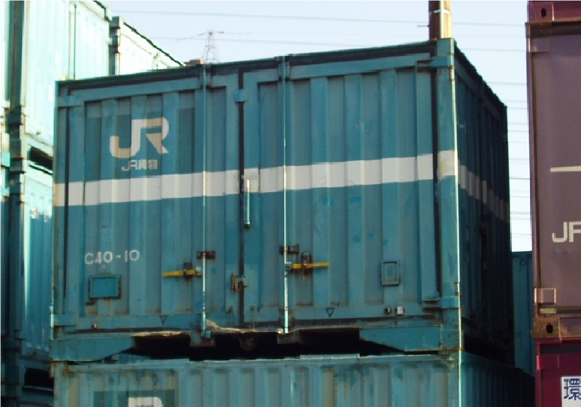 撮影地＝【岡山／東水島貨物駅】